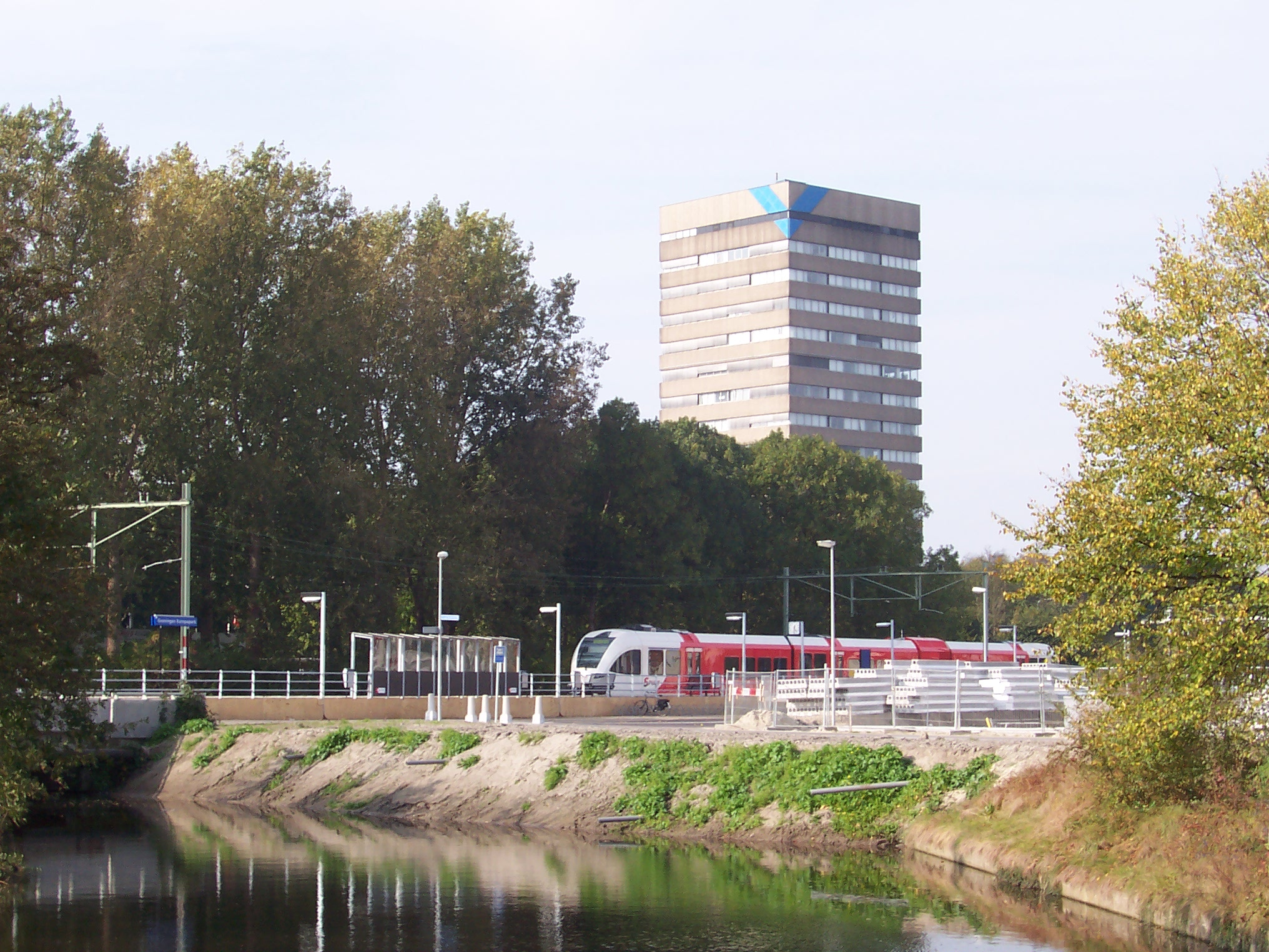 Groningen, Bahnhof Groningen Europapark